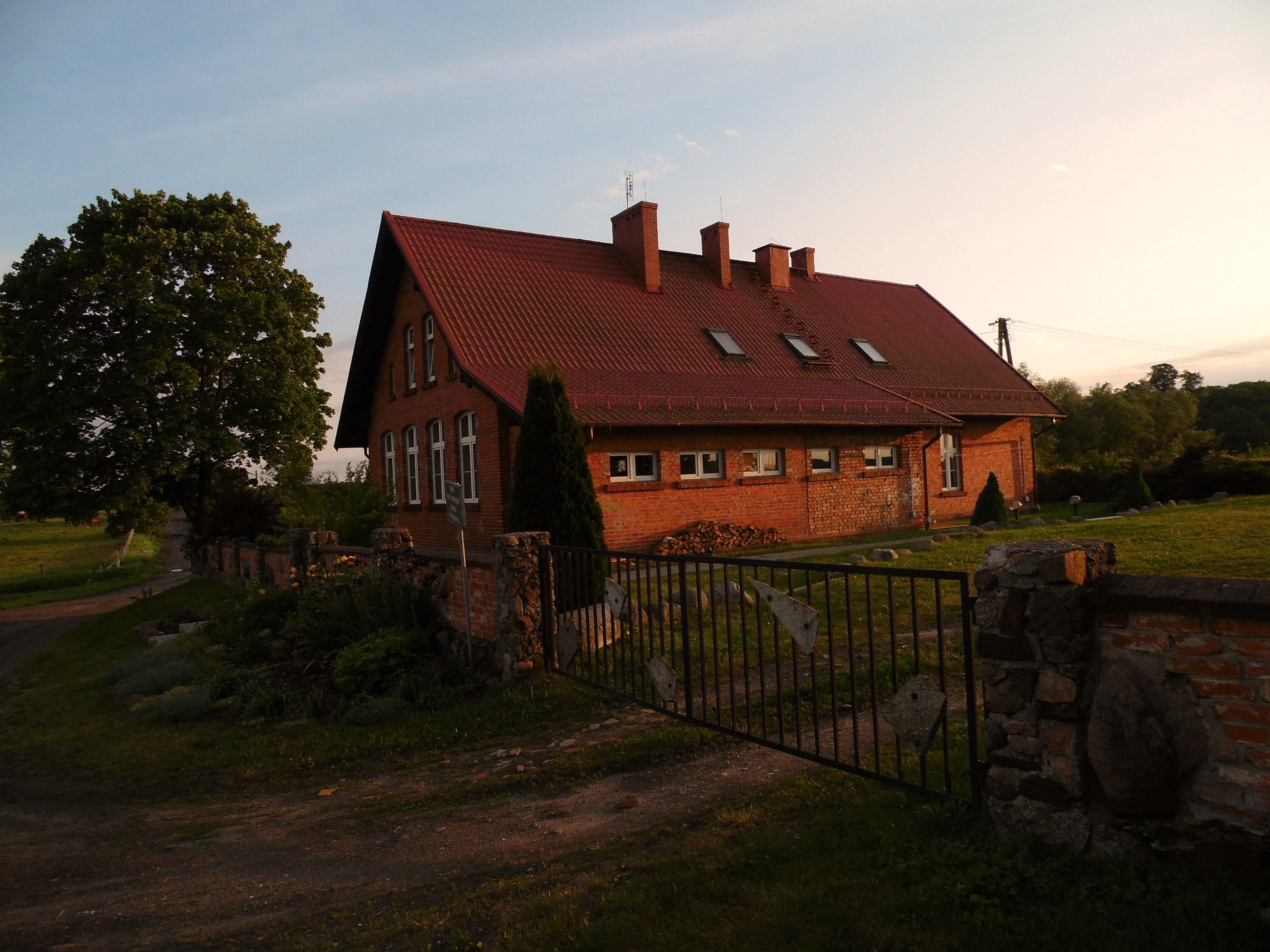 Dawna Szkoła.